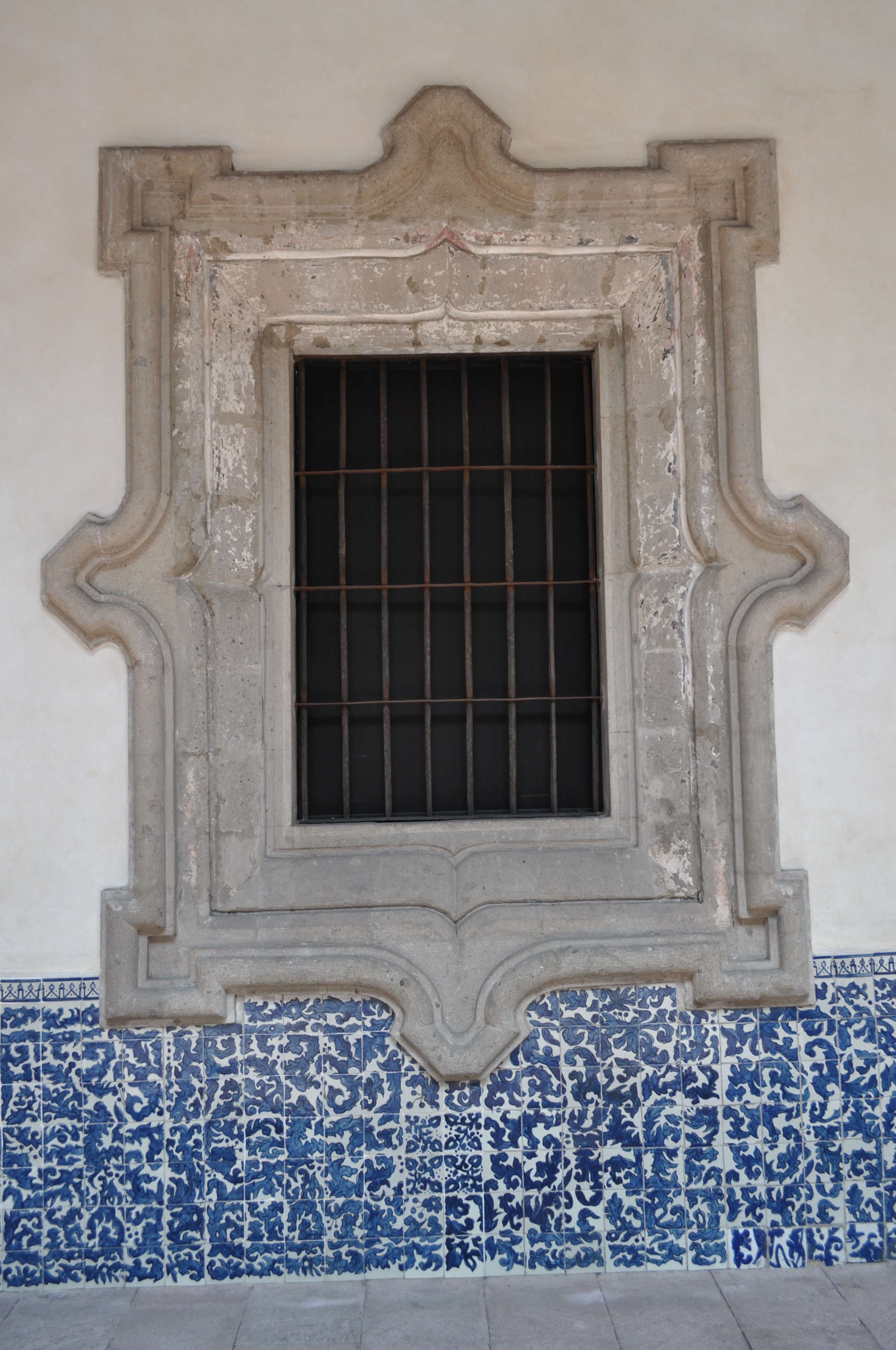 Ex Convento de Betlemitas